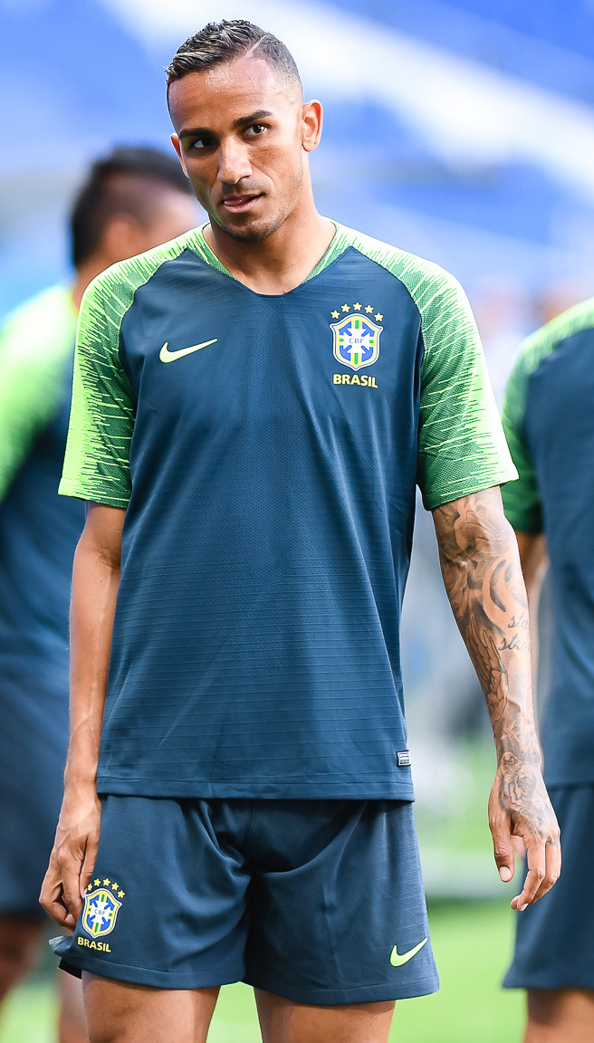 Бразилия и Швейцария готовятся к очной встрече на «Ростов Арене»